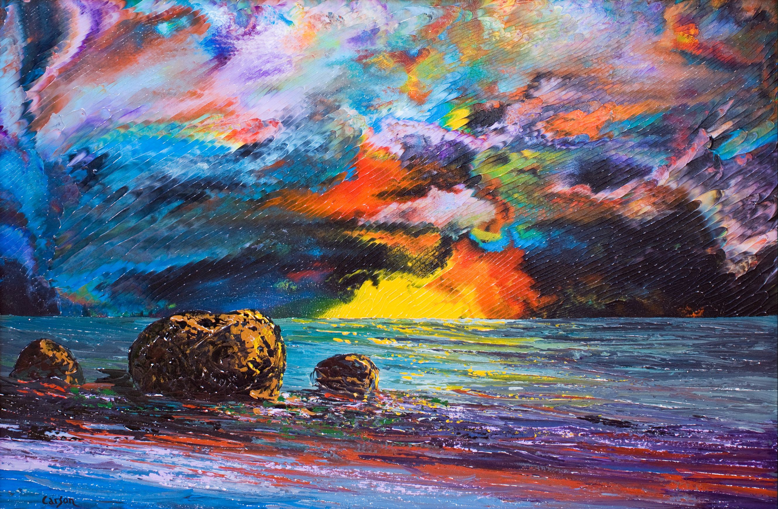 Parc Tairona II - 61 X 92 cm - Acrylique sur toile - Mouvement carsonisme